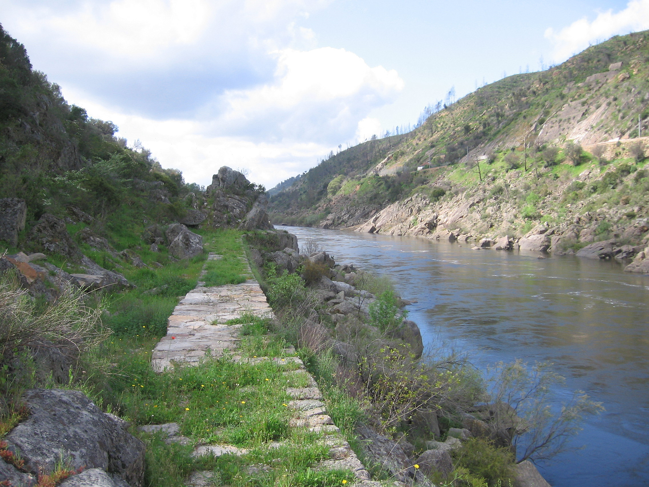 Muro de sirga, Tejo, Amieira do Tejo, Portugal